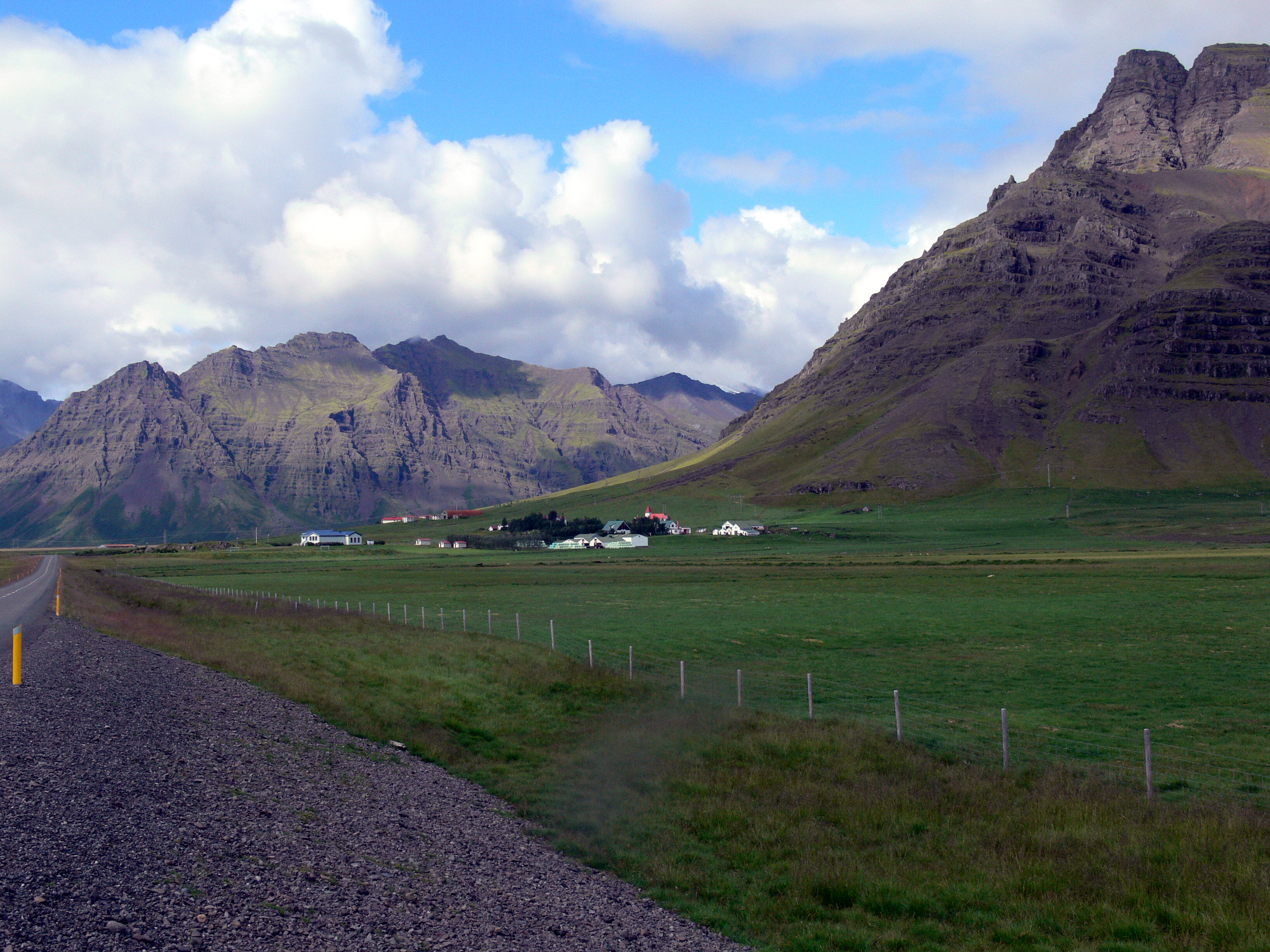 Kálfafellsstaður mit den Bergen Kálfafellstindur vorn und Staðarfjall hinten.